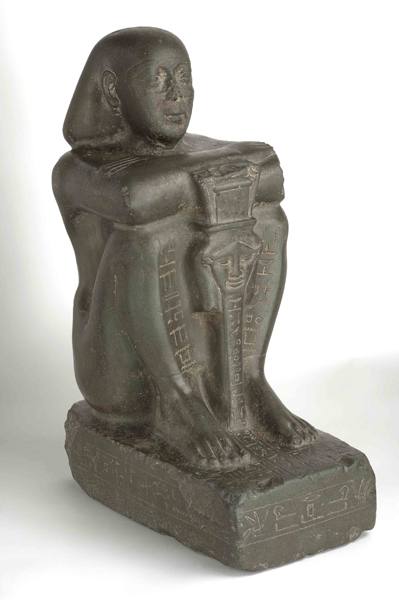 Estatua de Harsomtus em hat (Psamético I). Número de inventario: 2014.